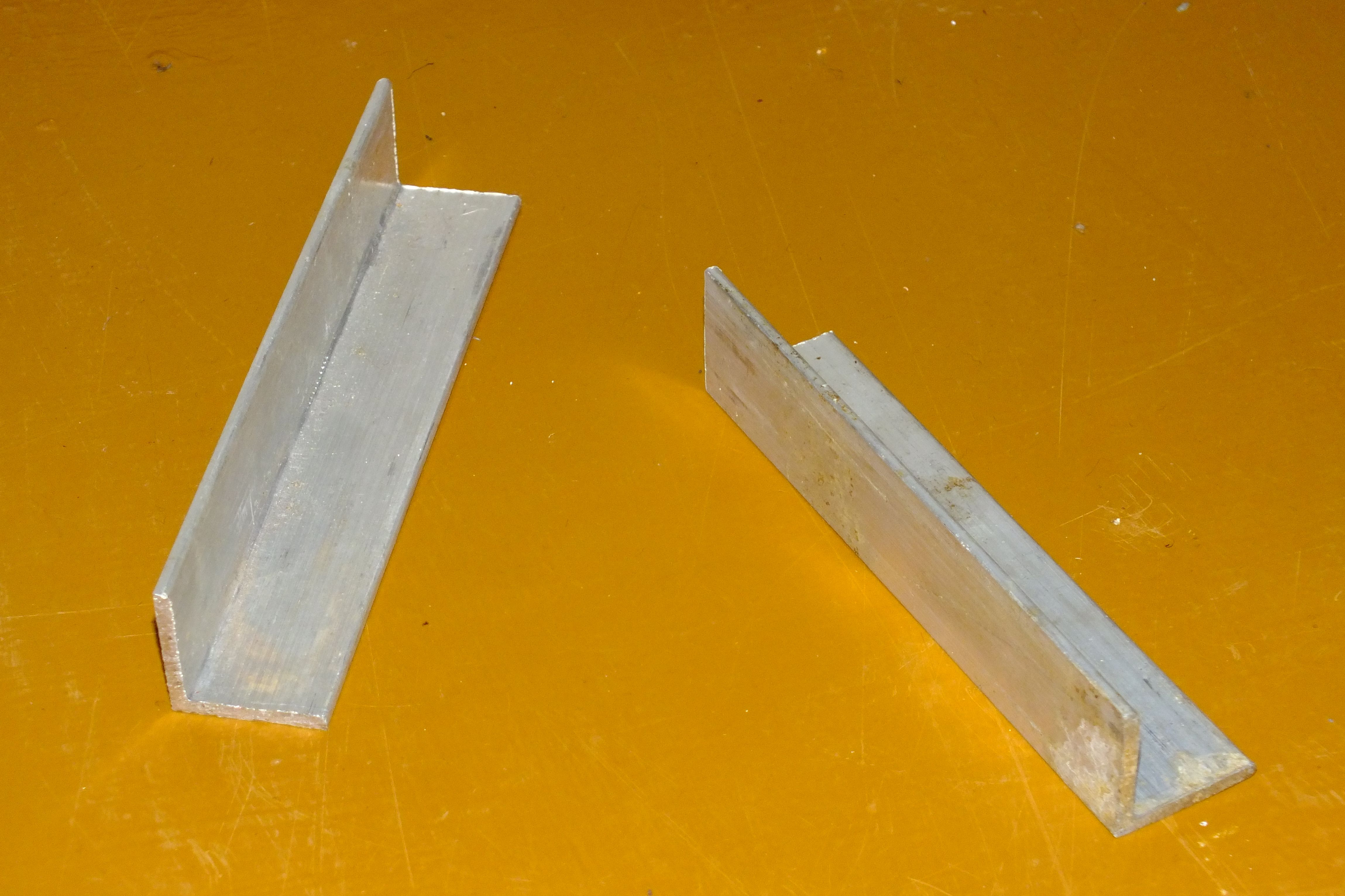 Дюралюминиевые уголки